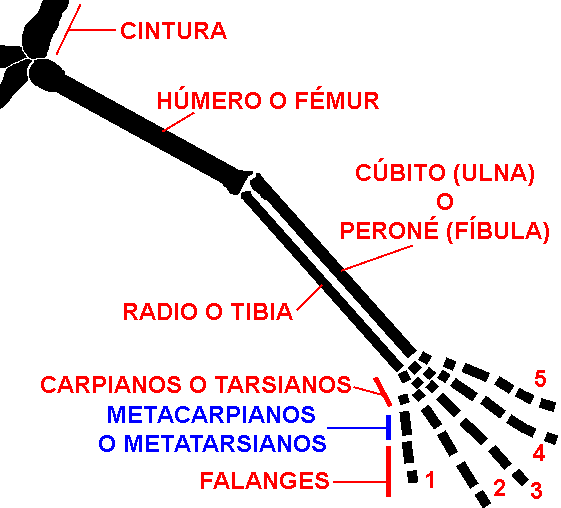 Estructura general del quiridio de tetrápodos. Autor: Francisco Collantes